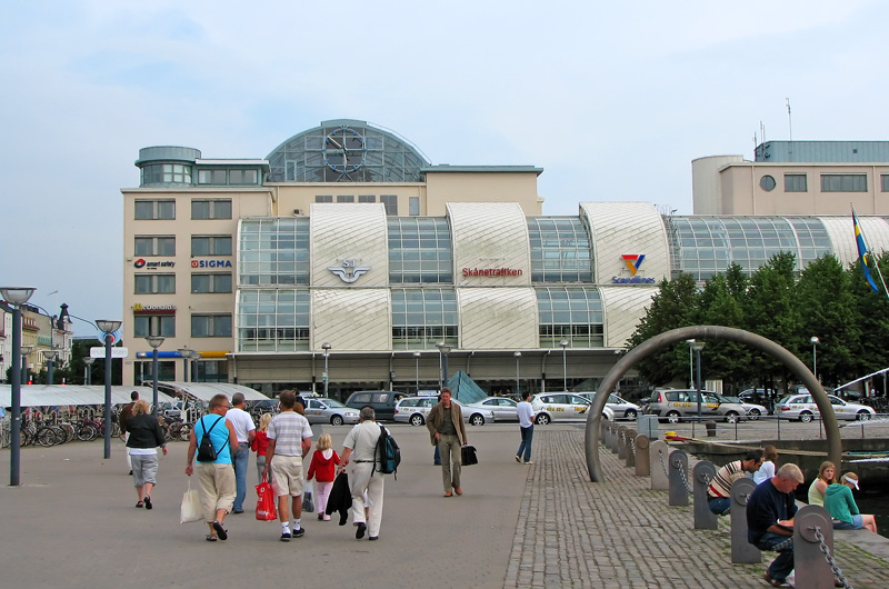 Knutpunkten central station, Helsingborg, Sweden